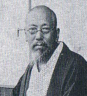 児玉果亭肖像写真